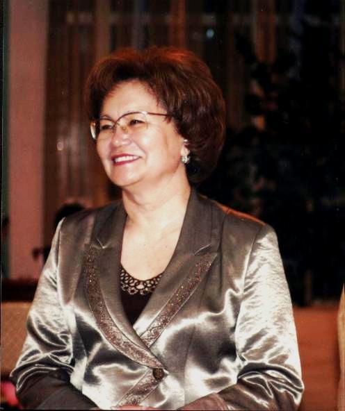 Мария Кенжеахмет